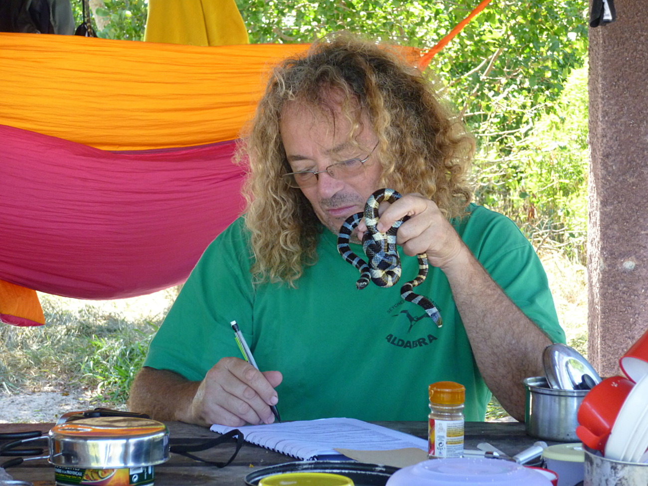 Luc Fougeirol het deelgeneem aan 'n studie wat deur CNRS-navorsers gedoen is oor mariene slange van Nieu-Kaledonië wat bekend staan as "gestreepte truie".